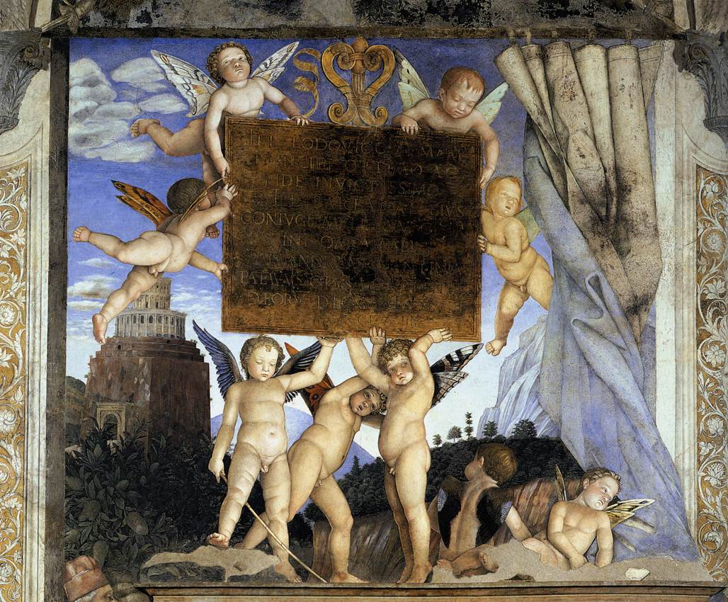 Camera picta, l'incontro